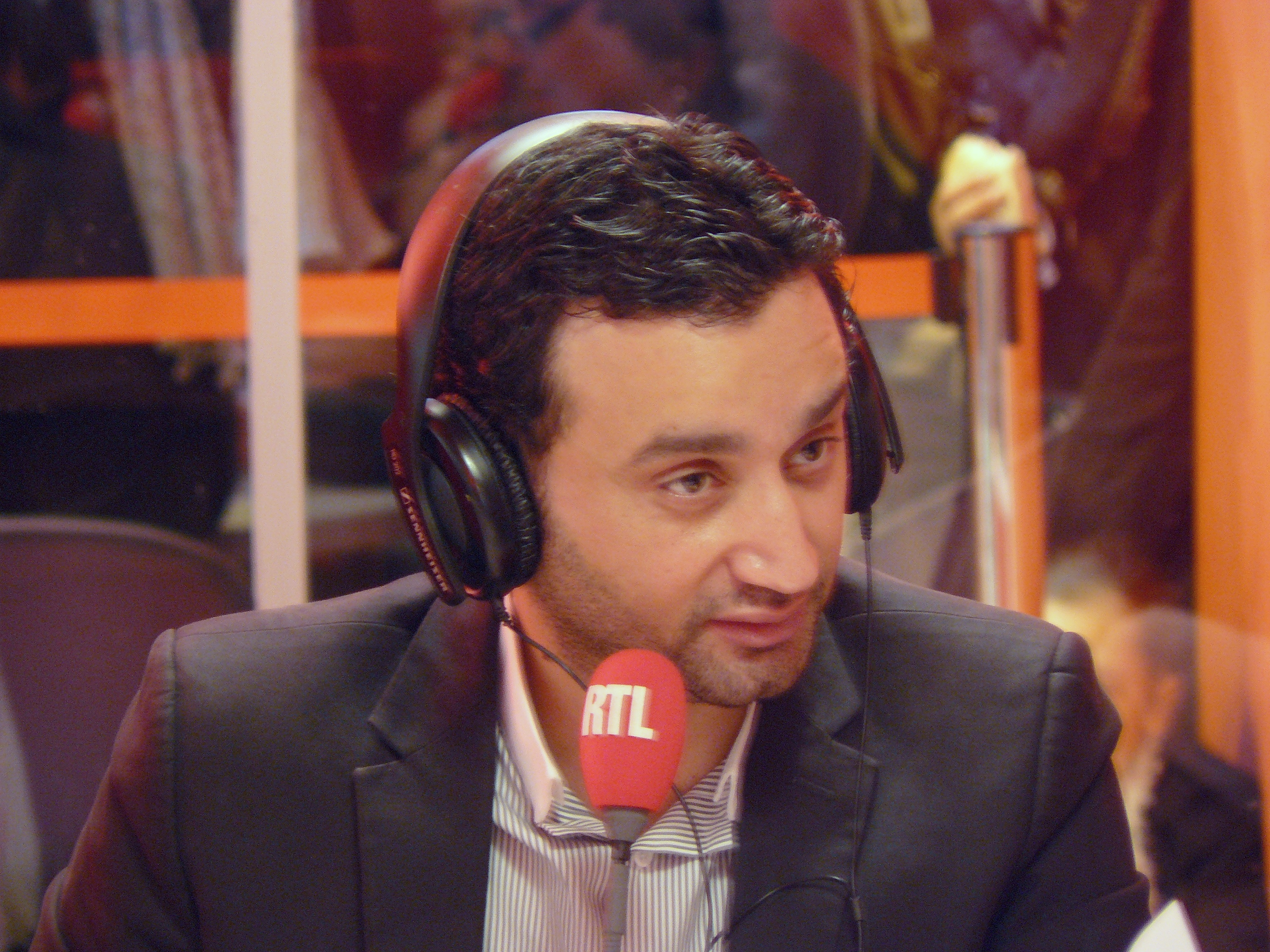 Cyril Hanouna, animateur radio/télévision, le 2 mars 2010 lors d'un plateau radio de RTL au Salon de l'agriculture à Paris.